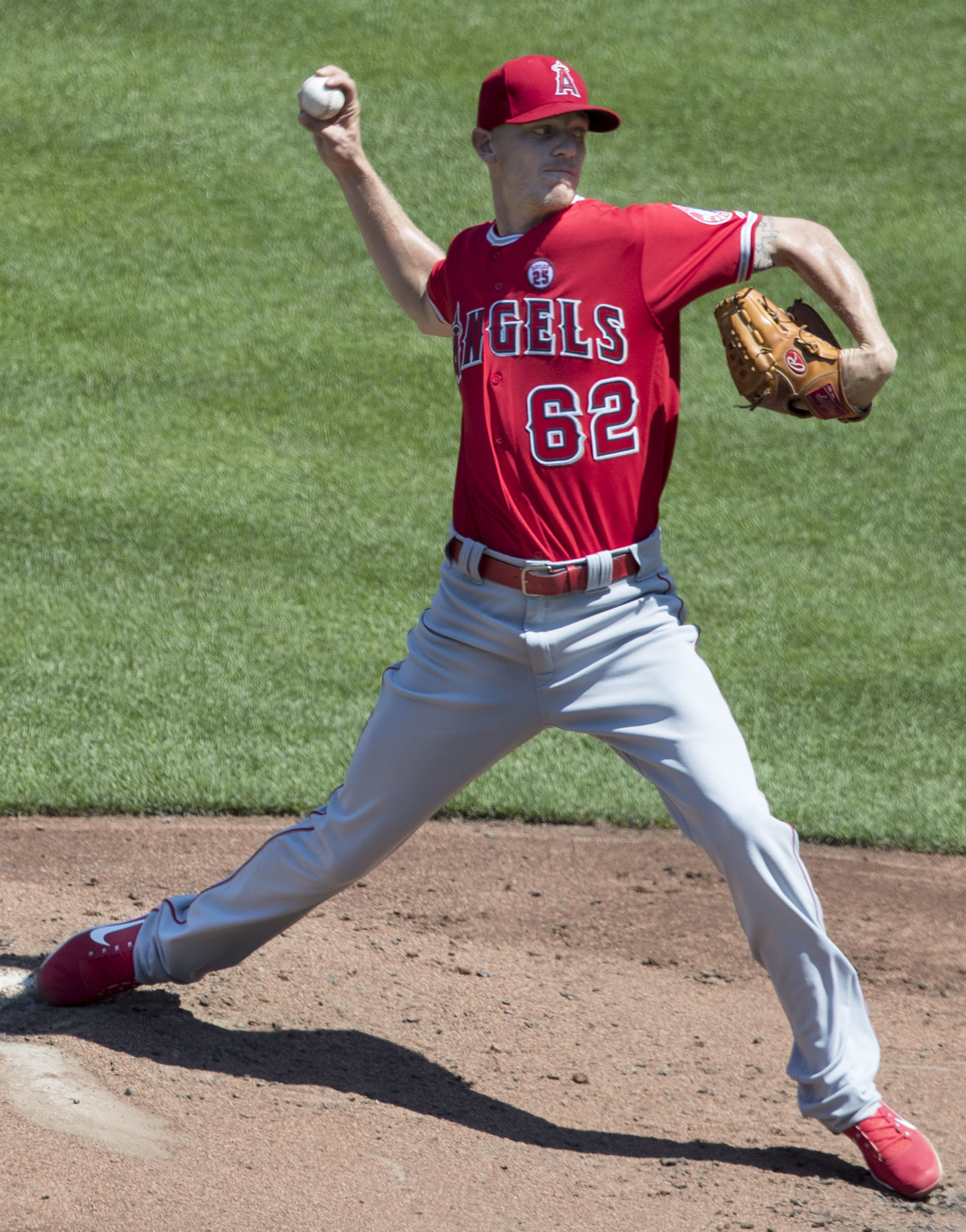 Angels at Orioles 8/20/17